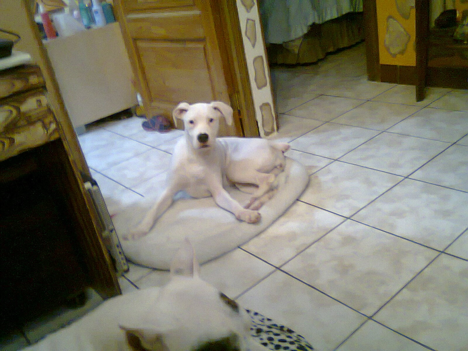 Dogo Guatemalteco Hembra, Nombre Nieve, propietario Oscar E. Lorenzana Gallusser